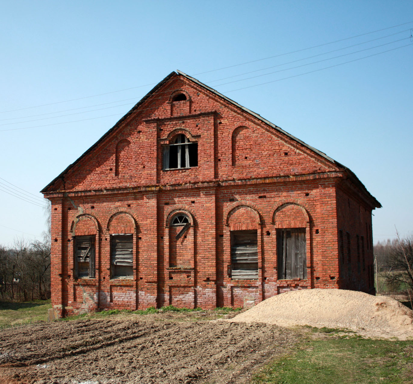 Čekiškės sinagoga, vaizdas iš rytų pusės. G. Kulikausko fotografija, 2011 m. balandis.